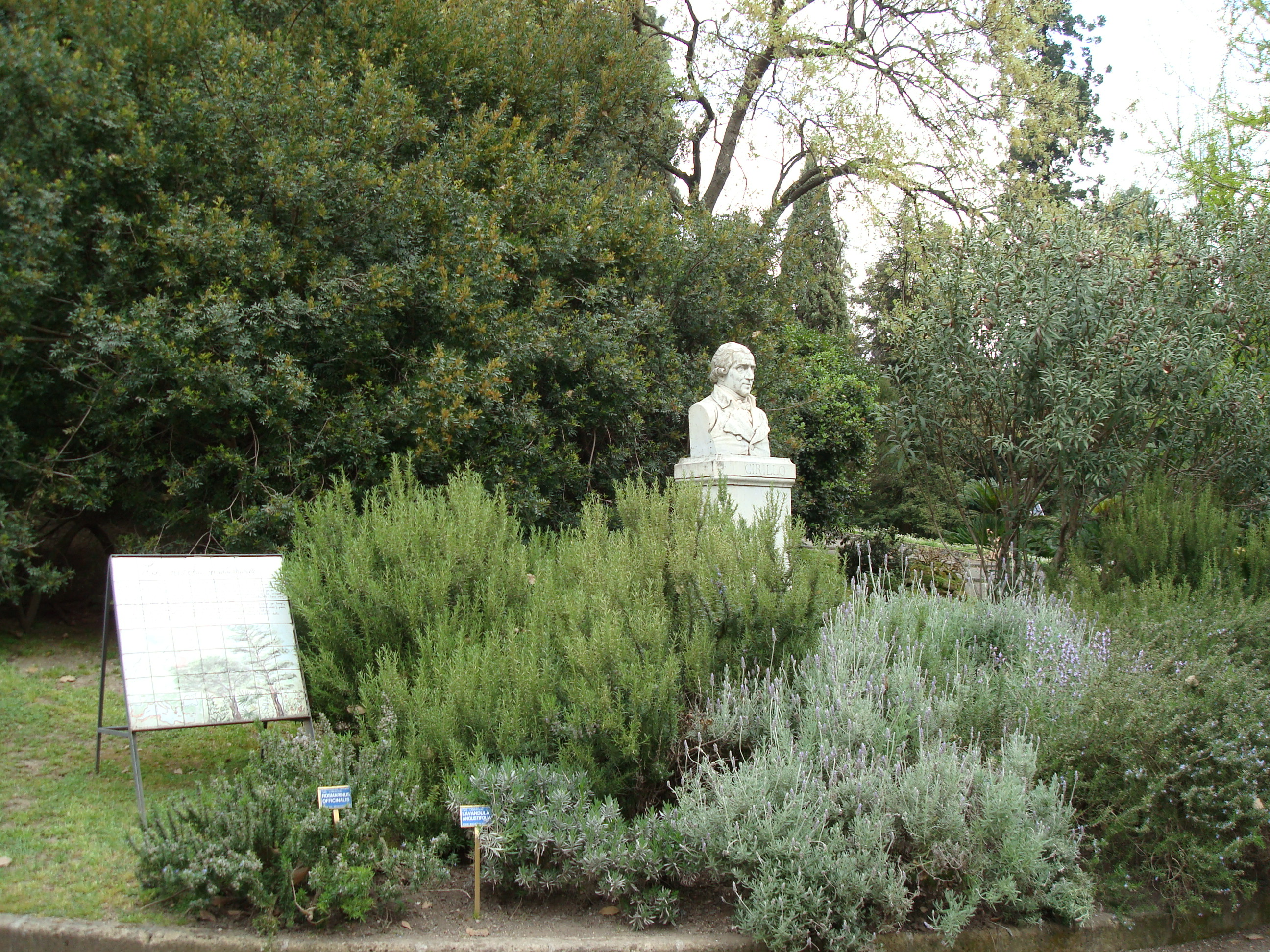 Jardin botanique de Naples : plantes du maquis méditerranéen et buste de Domenico Maria Leone Cirillo